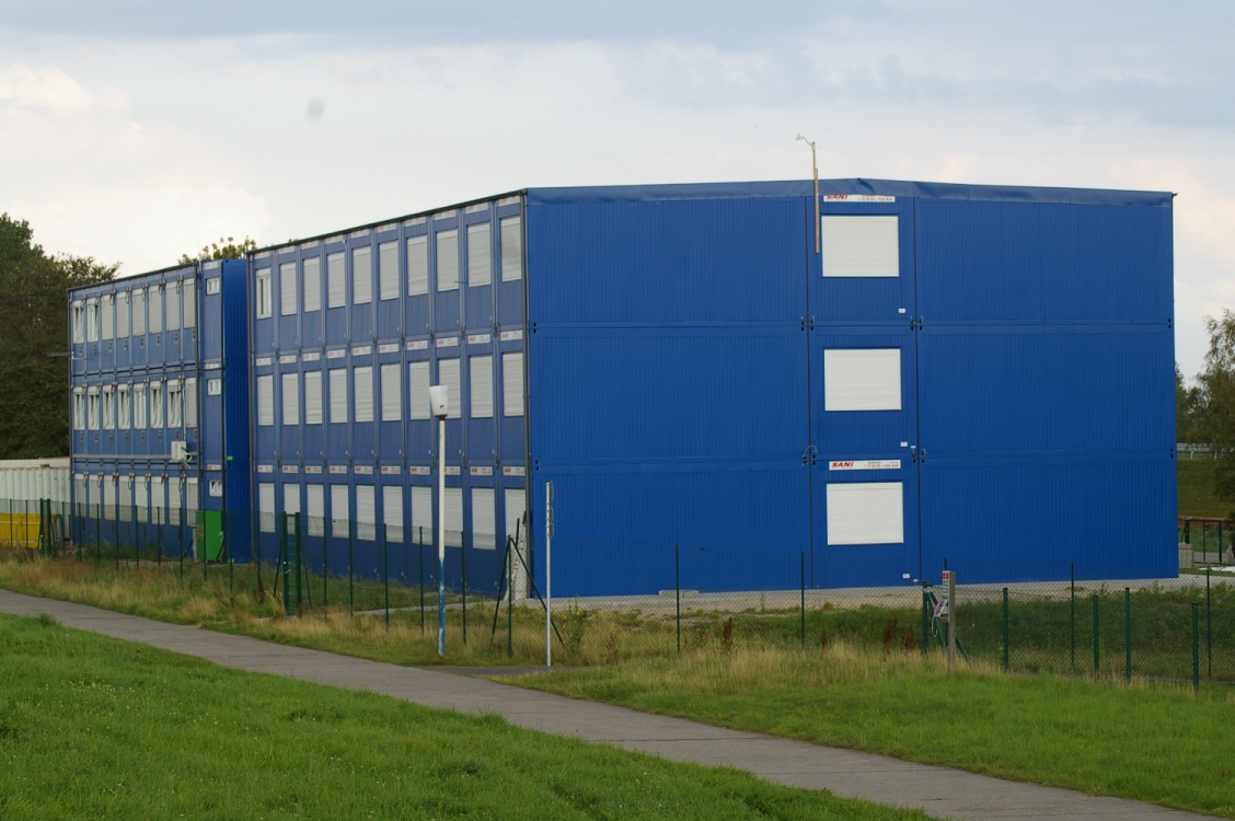 BüroContainer